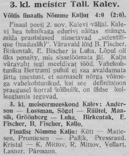 3. klassi meister